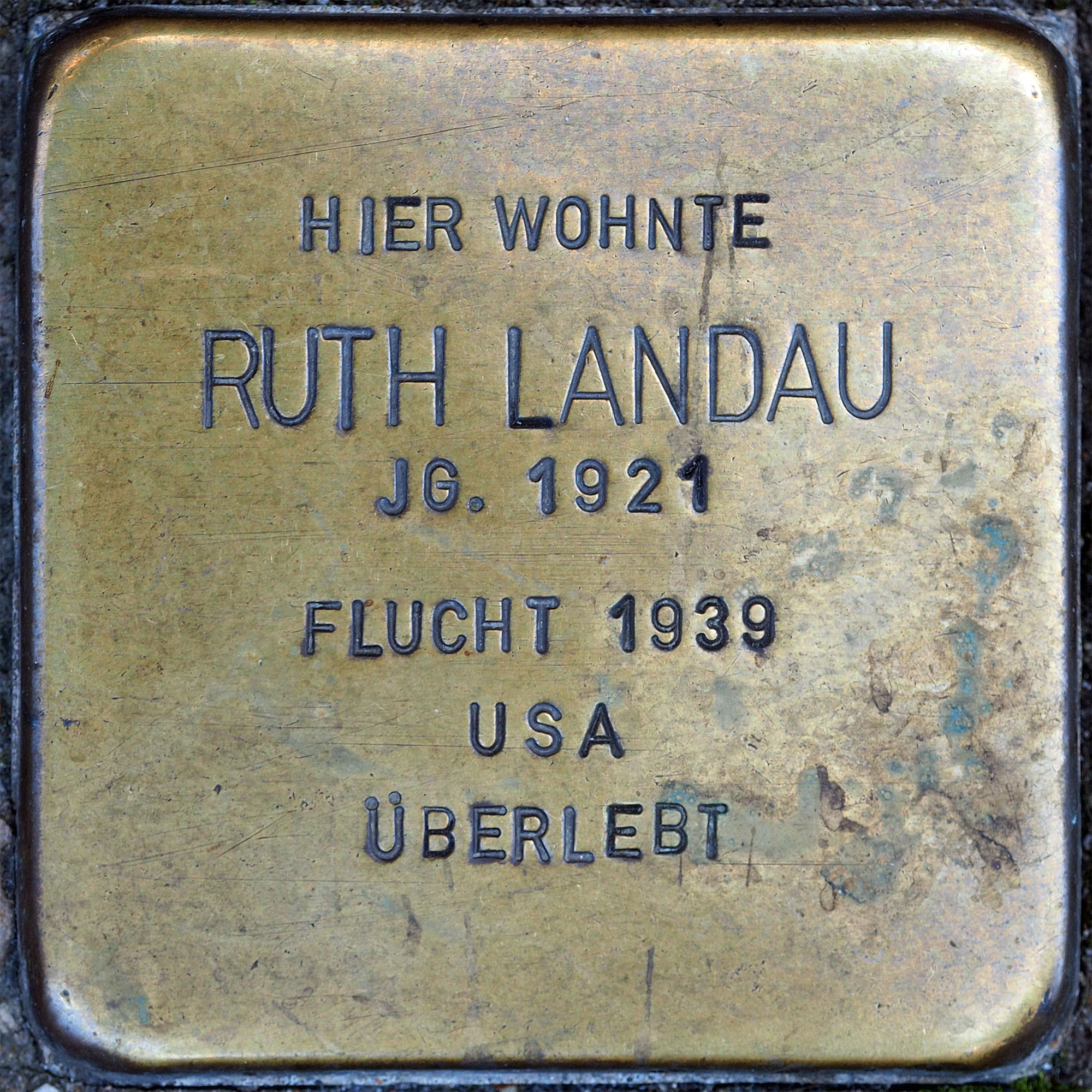 Stolpersteine Wesel: Landau, Ruth